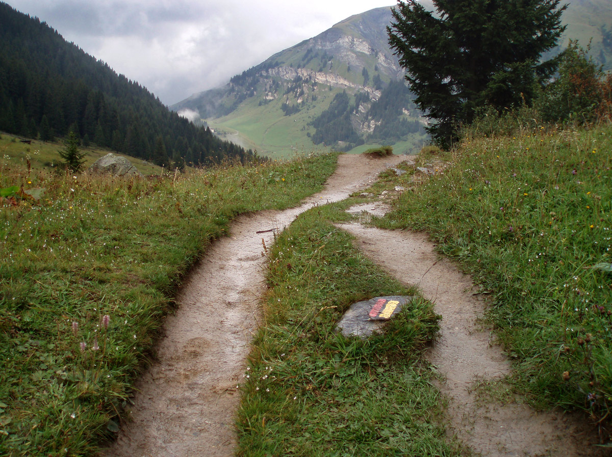 Sentier de randonnée en Savoie, près du lac de Saint Guérin.